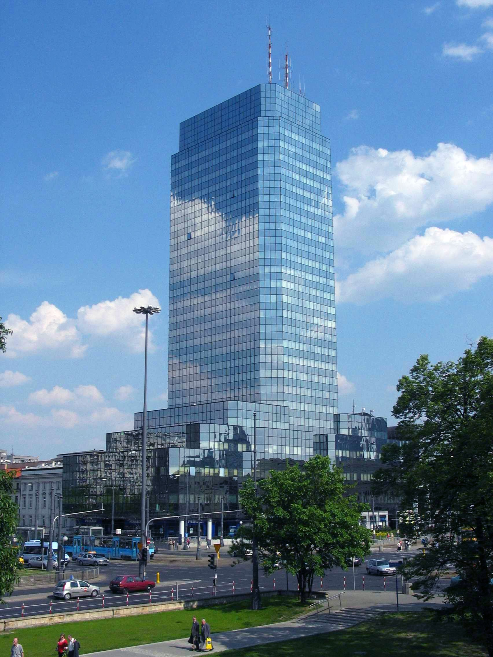 Błękitny Wieżowiec w Warszawie - widok od strony kina Muranów